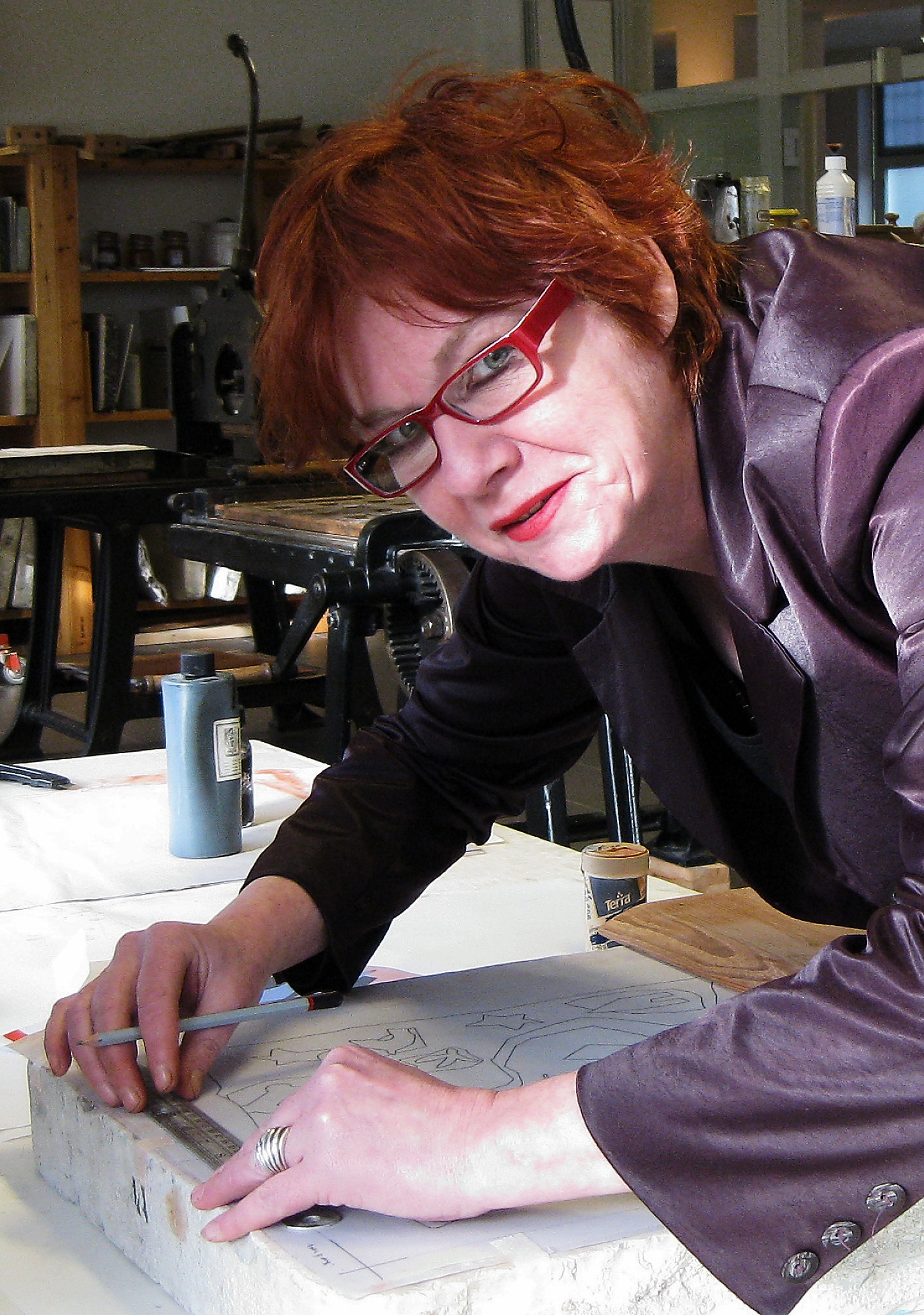 Sylvia Weve maakt in 2008 in het Nederlands Steendrukmuseum een kleurenlitho bij een artikel van Naema Tahir voor het in 2009 verschenen Wereldboek.